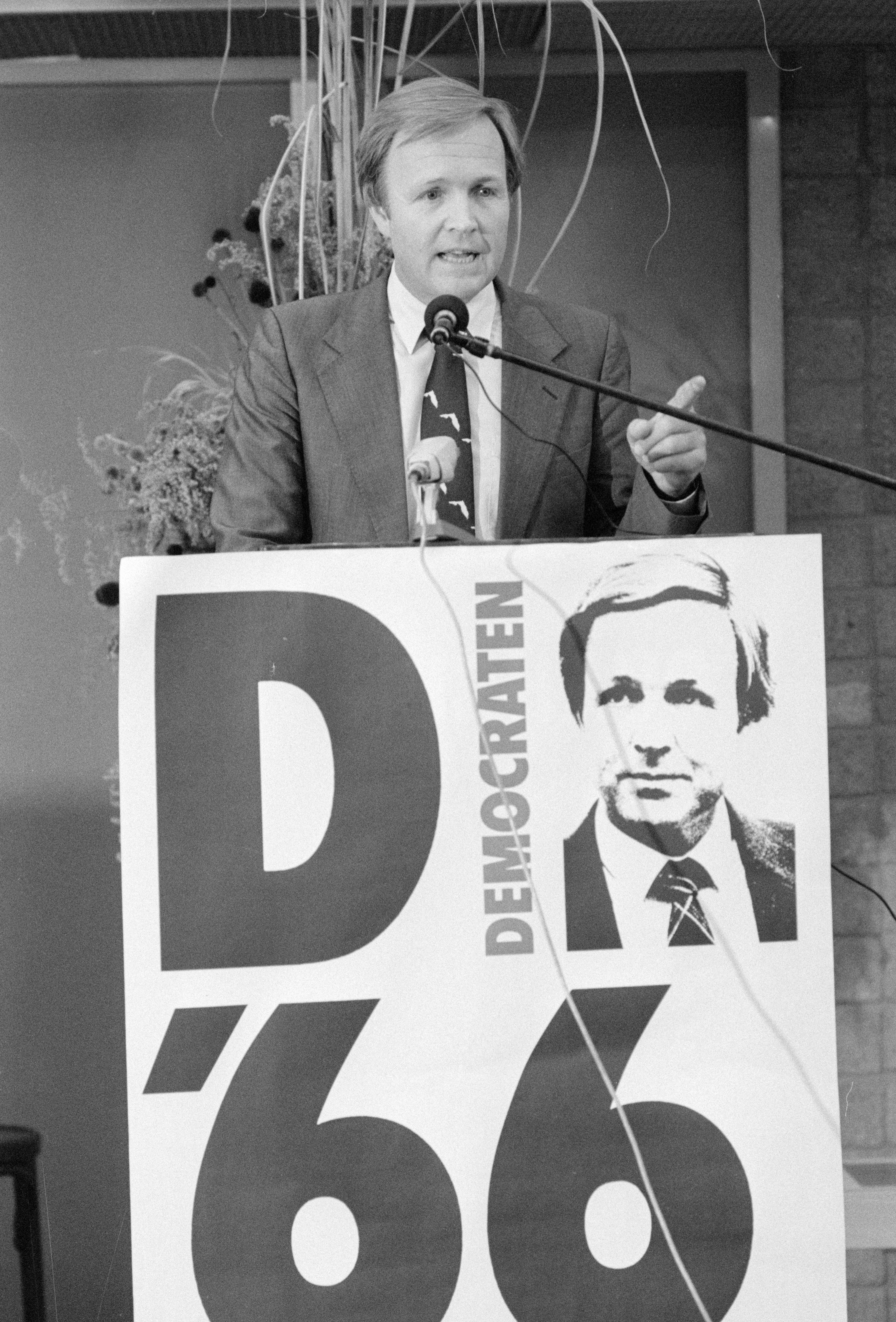 Nationaal Archief Beschrijving: Lijsttrekker Jan Terlouw tijdens toespraak. Start verkiezingscampagne D66 in Den Haag . Datum: 14 augustus 1982 Bestanddeelnummer NL-HaNA_Anefo_932-2775 Vervaardiger: Dijk, Hans van / Anefo URL: Voor meer informatie over het Nationaal Archief: Voor meer foto's uit deze en andere collecties, bezoek onze Beeldbank:, U kunt ons helpen onze kennis van de fotocollecties te verrijken door tags en commentaren toe te voegen. Herkent u mensen of locaties of heeft u een bijzonder verhaal te vertellen bij één van de foto's, laat dan een reactie achter (als u ingelogd bent bij Flickr) of stuur een mailtje naar